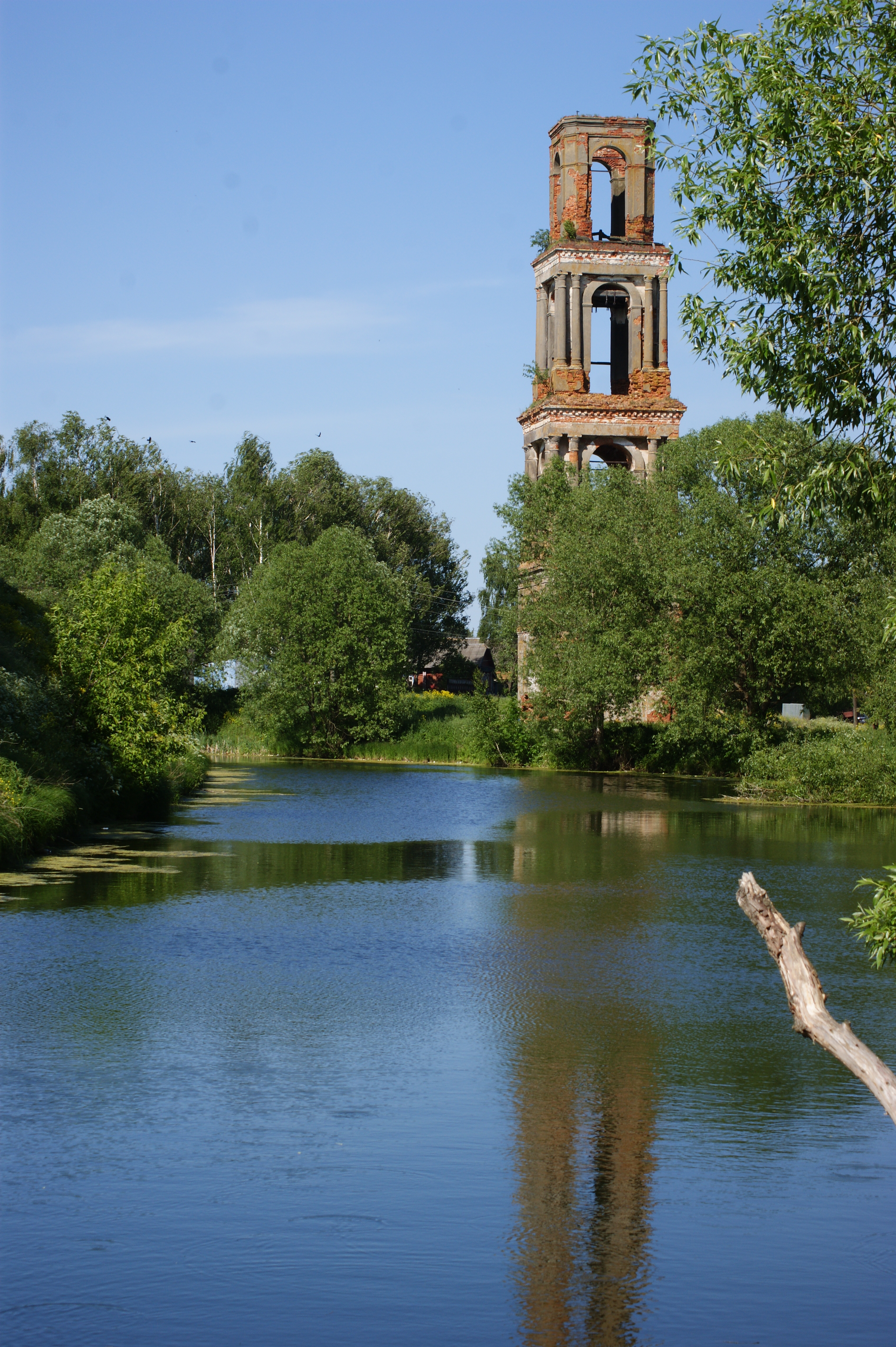 Колокольня церкви Воскресения: Городище, Юрьев-Польский район, Владимирская область